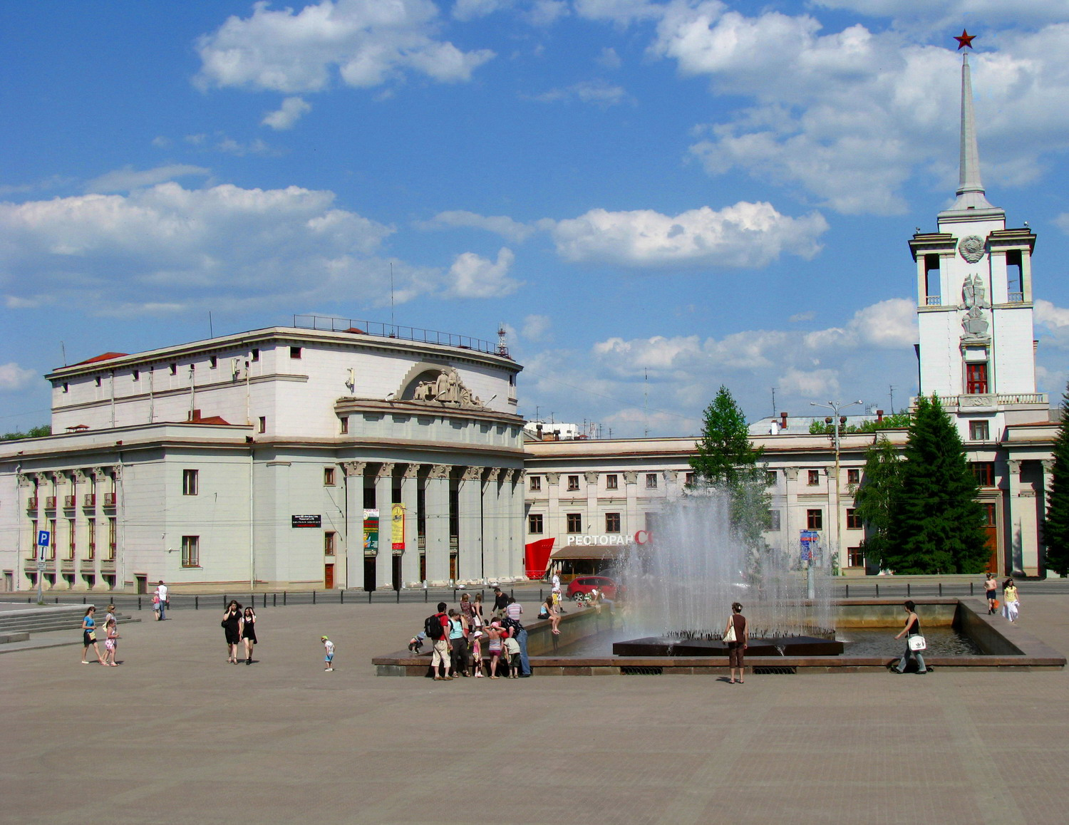 Окружной Дом Офицеров ПУрВО в Екатеринбурге